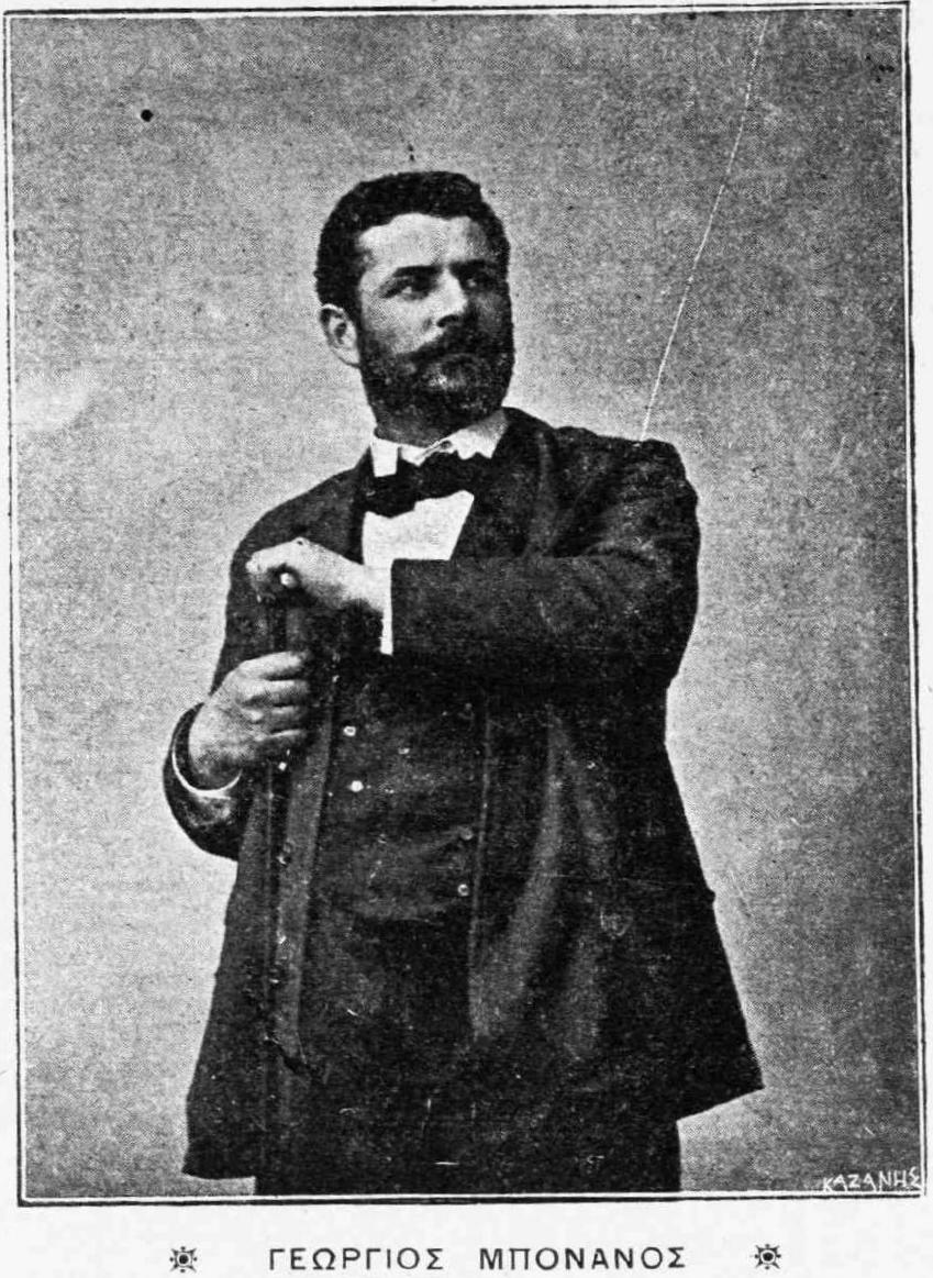 Georgios Mponanos, griechischer Bildhauer, 19., u. 20. Jahrhundert